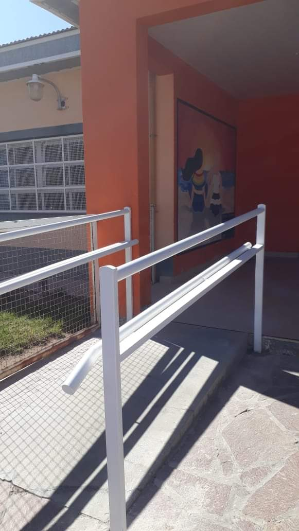 Mural en en el que los estudiantes plasmaron su percepción acerca de la búsqueda de identidad.